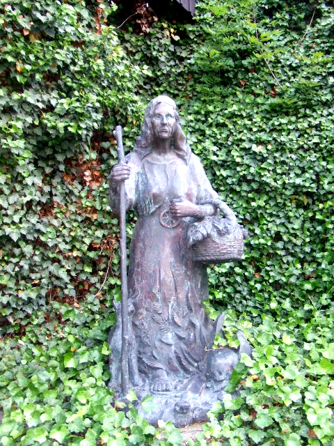 Veringenstadt, Landkreis Sigmaringen Denkmal für Anna Bader („einziges Denkmal in Deutschland für eine als Hexe zum Tod verurteilte Frau“)